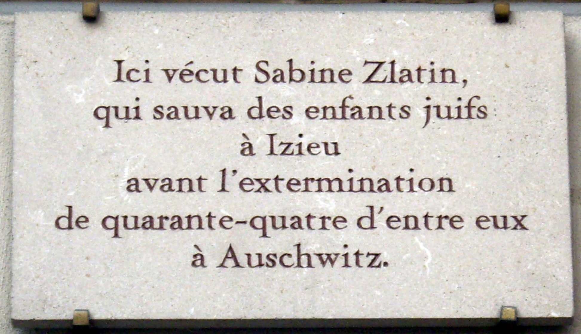 Plaque apposée au n° 46 de la rue Madame, Paris 6e, où vécut la résistante Sabine Zlatin (1907-1996).